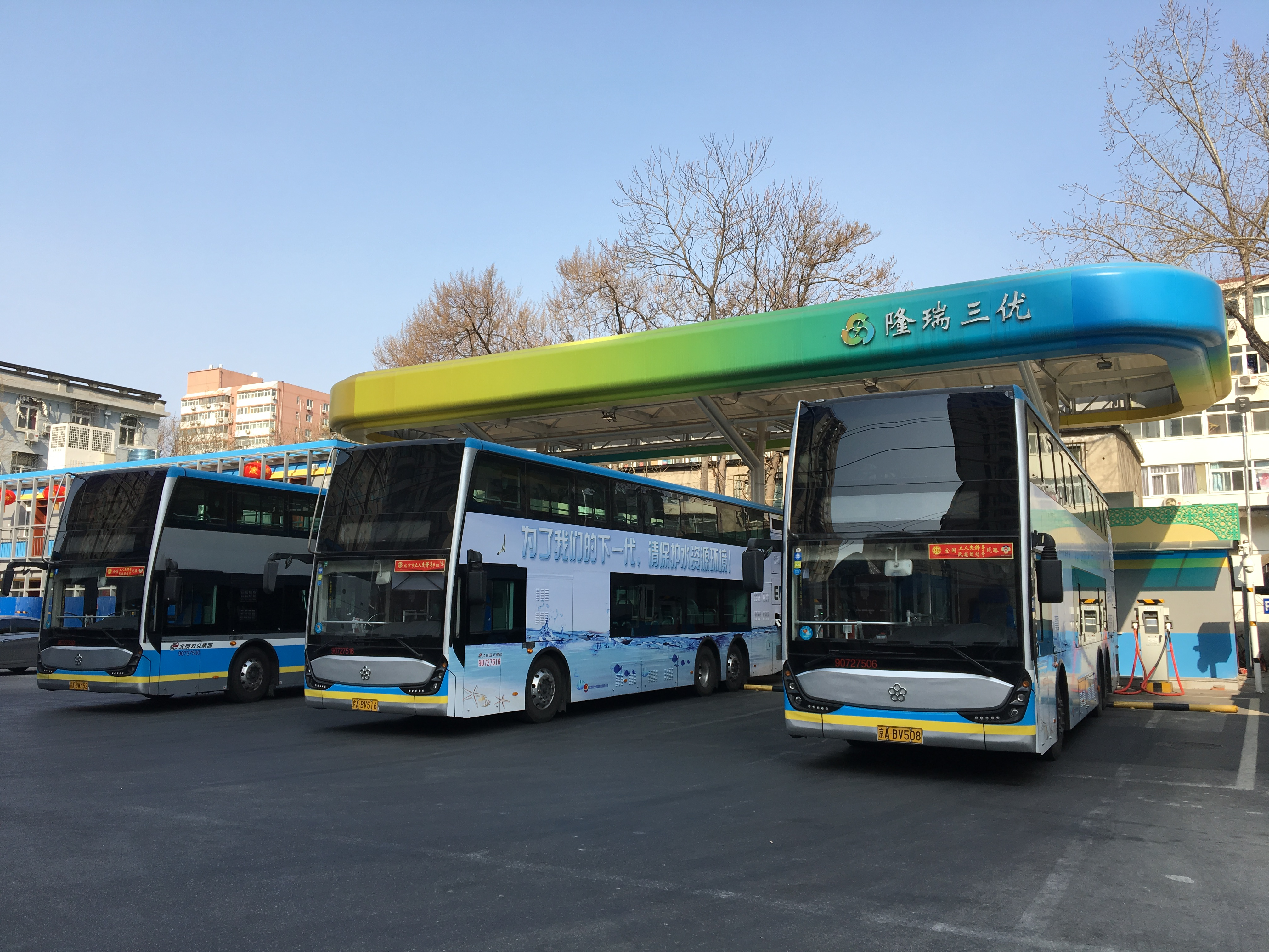 中文（中国大陆）: 北京南菜园公交总站。10路电动公交车品牌为珠海银隆，充电桩为龙瑞三优。